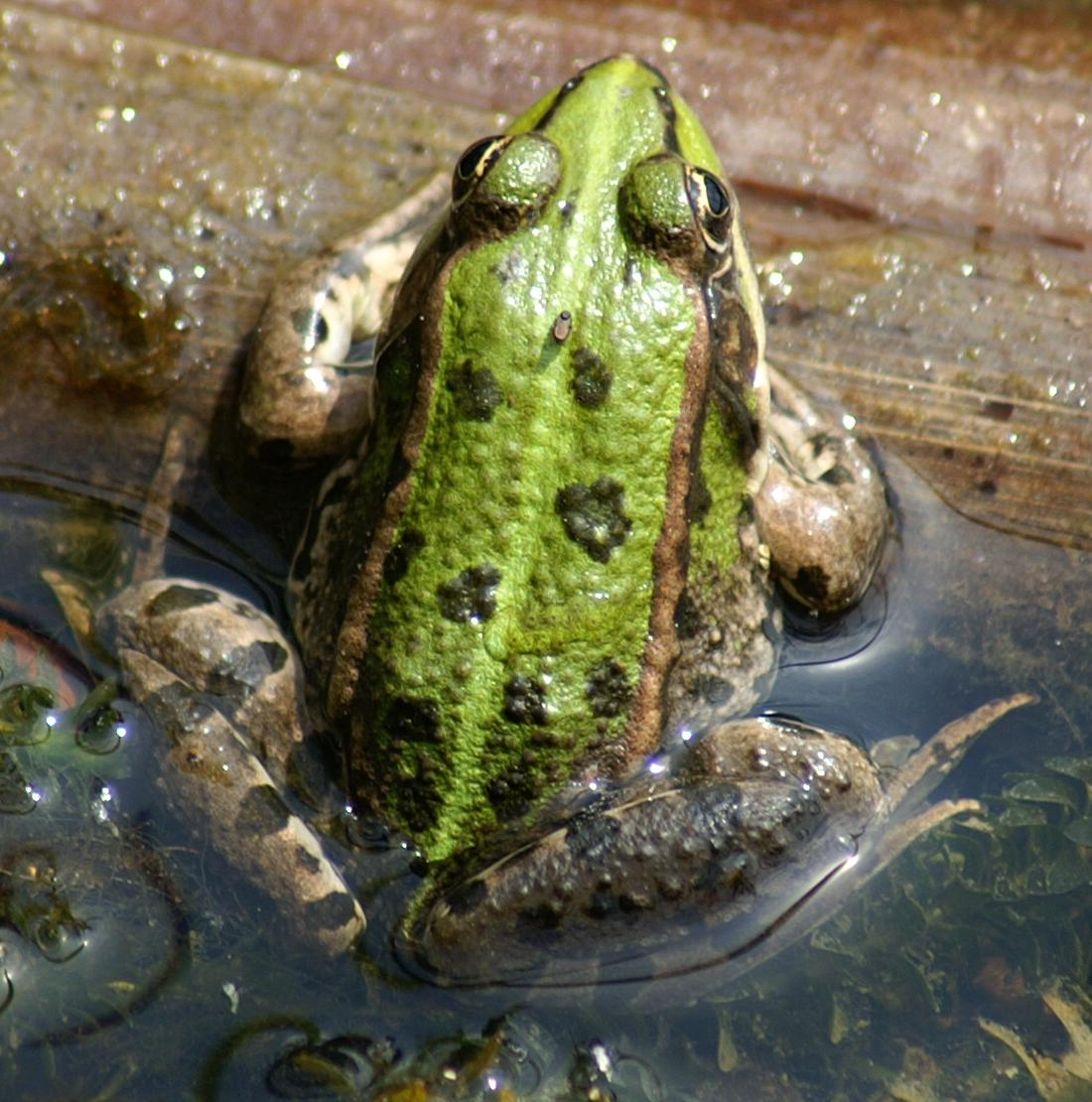 Der Seefrosch (Rana ridibunda; Syn.: Pelophylax ridibundus) gehört innerhalb der Ordnung der Froschlurche zur Familie der Echten Frösche und ebenso zur Gattung der Echten Frösche.